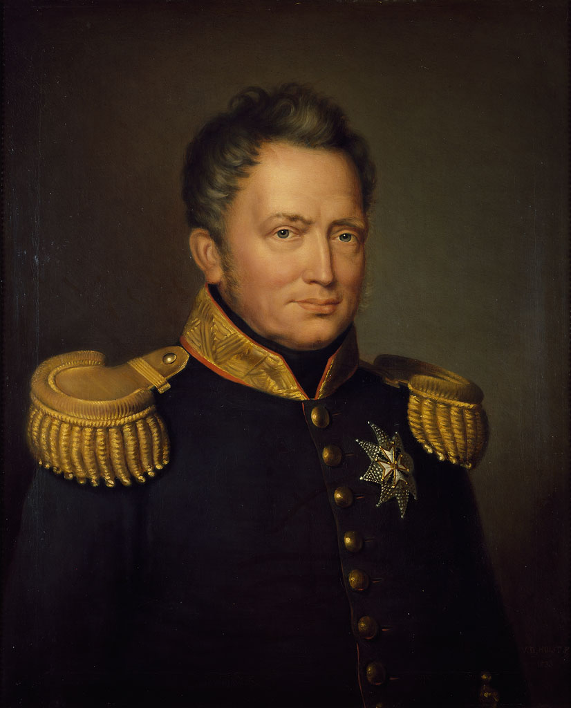 schilderij; portret; mansportret; Willem I, Koning